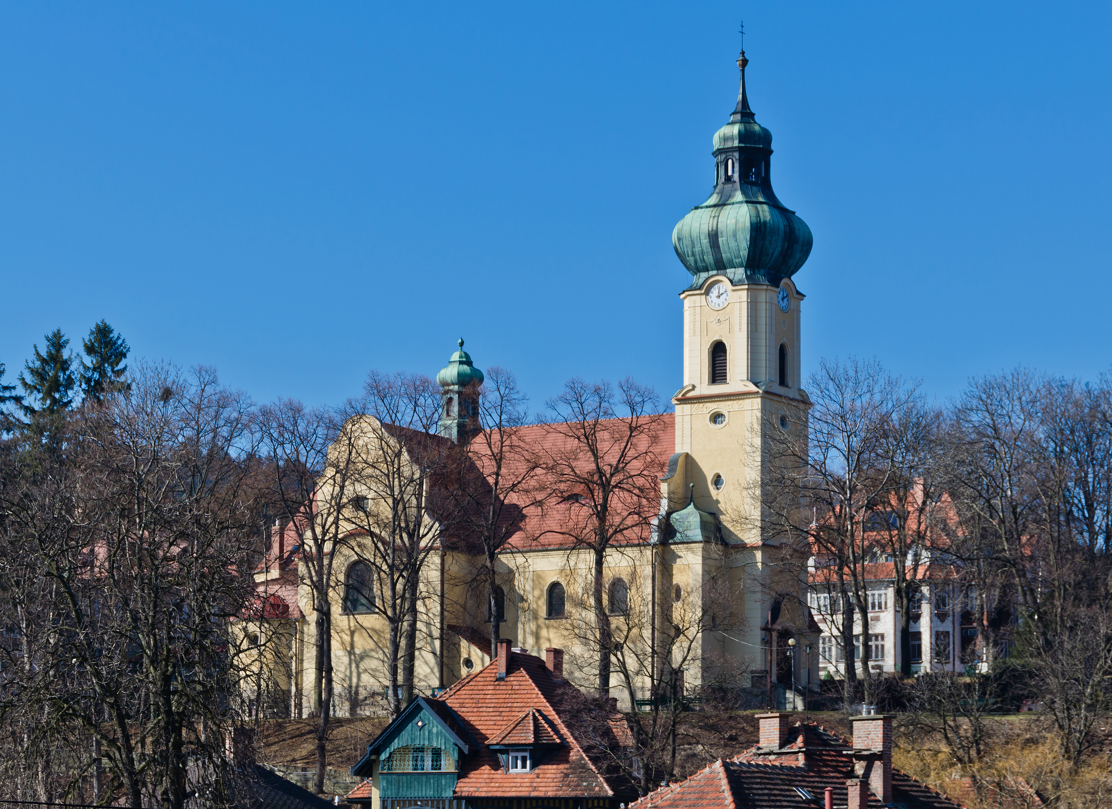 Polanica-Zdrój, kościół par. p.w. Wniebowzięcia NMP, 1910